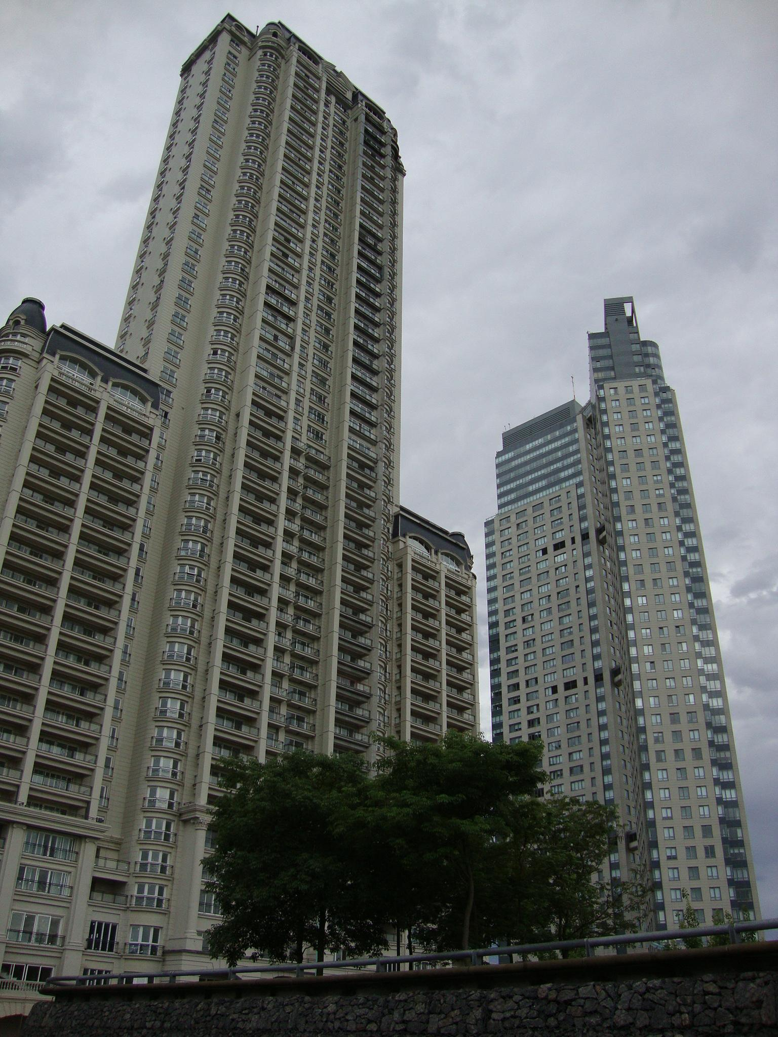 Hacia la izquierda, la Torre Château Puerto Madero. Hacia la derecha, las Torres El Faro. Puerto Madero, ciudad de Buenos Aires, Argentina.